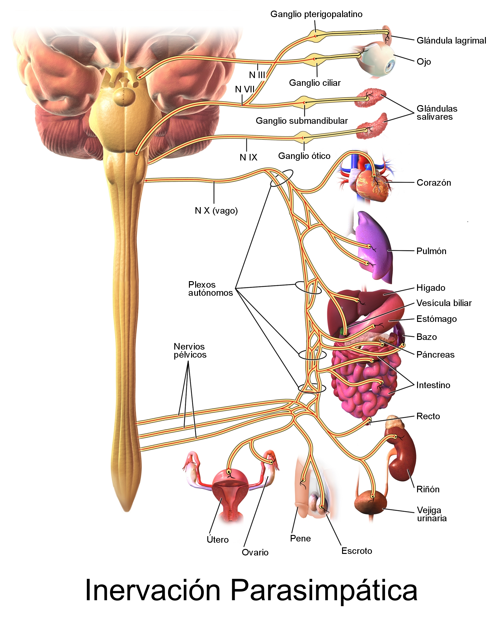 Esquema en el que se muestran la inervación por el sistema nervioso parasimpático de los órganos corporales